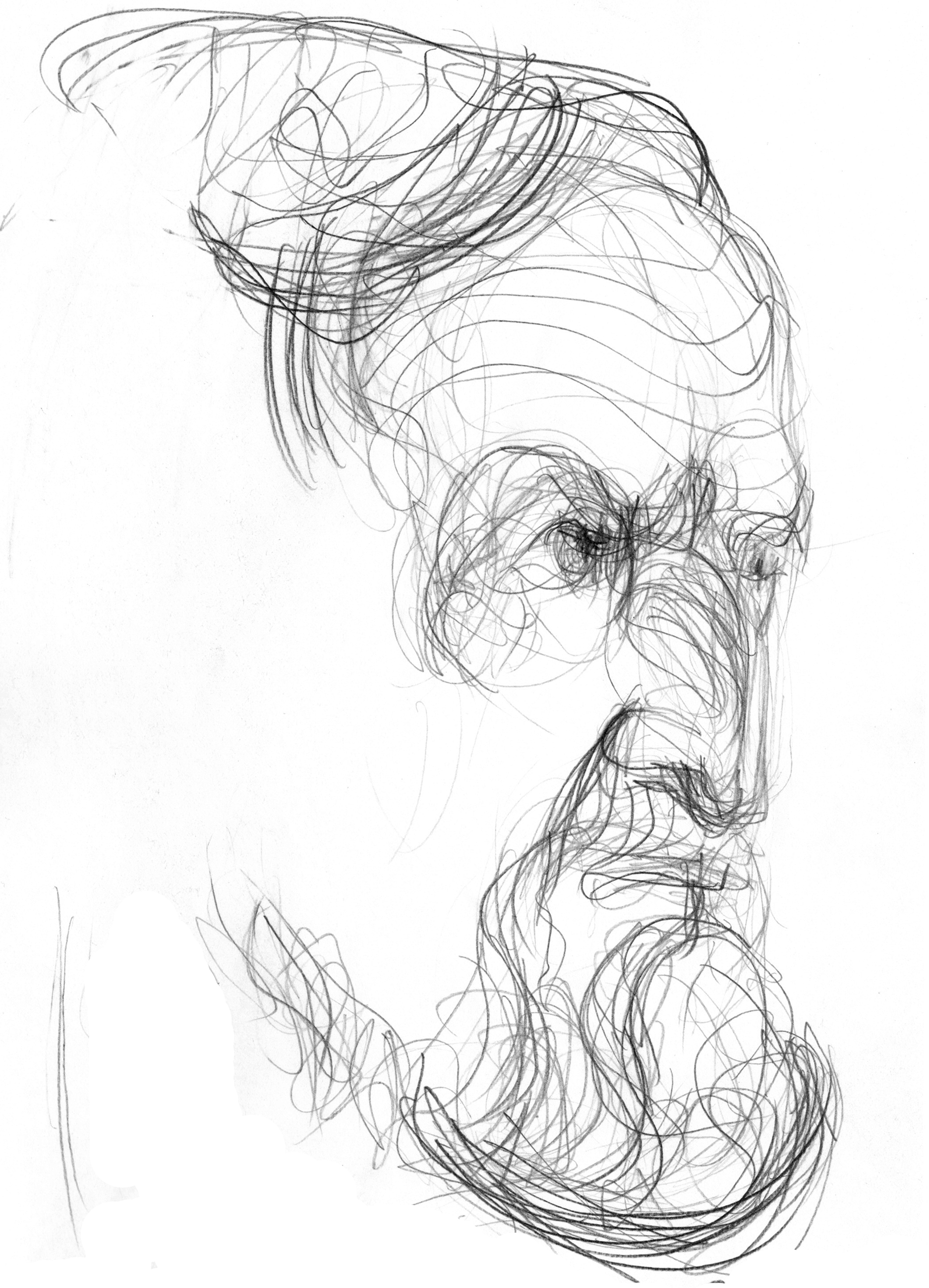 Портрет Бориса Парыгина в образе древнегреческого мыслителя. 30 х 21 cм, бумага, цв. карандаш.